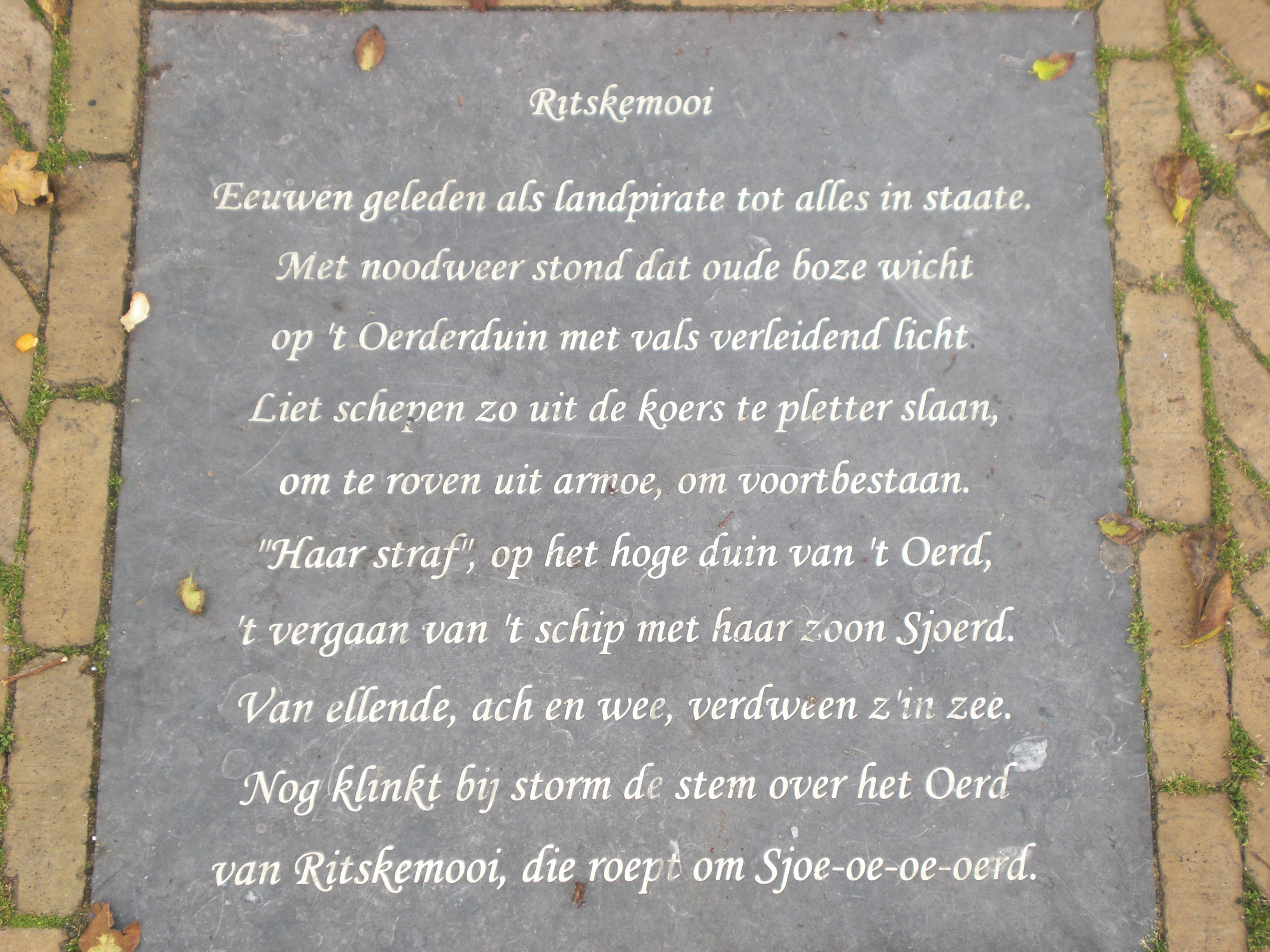 Informationstafel am Fuß der Statue der Ritskemooi in Buren (Ameland)